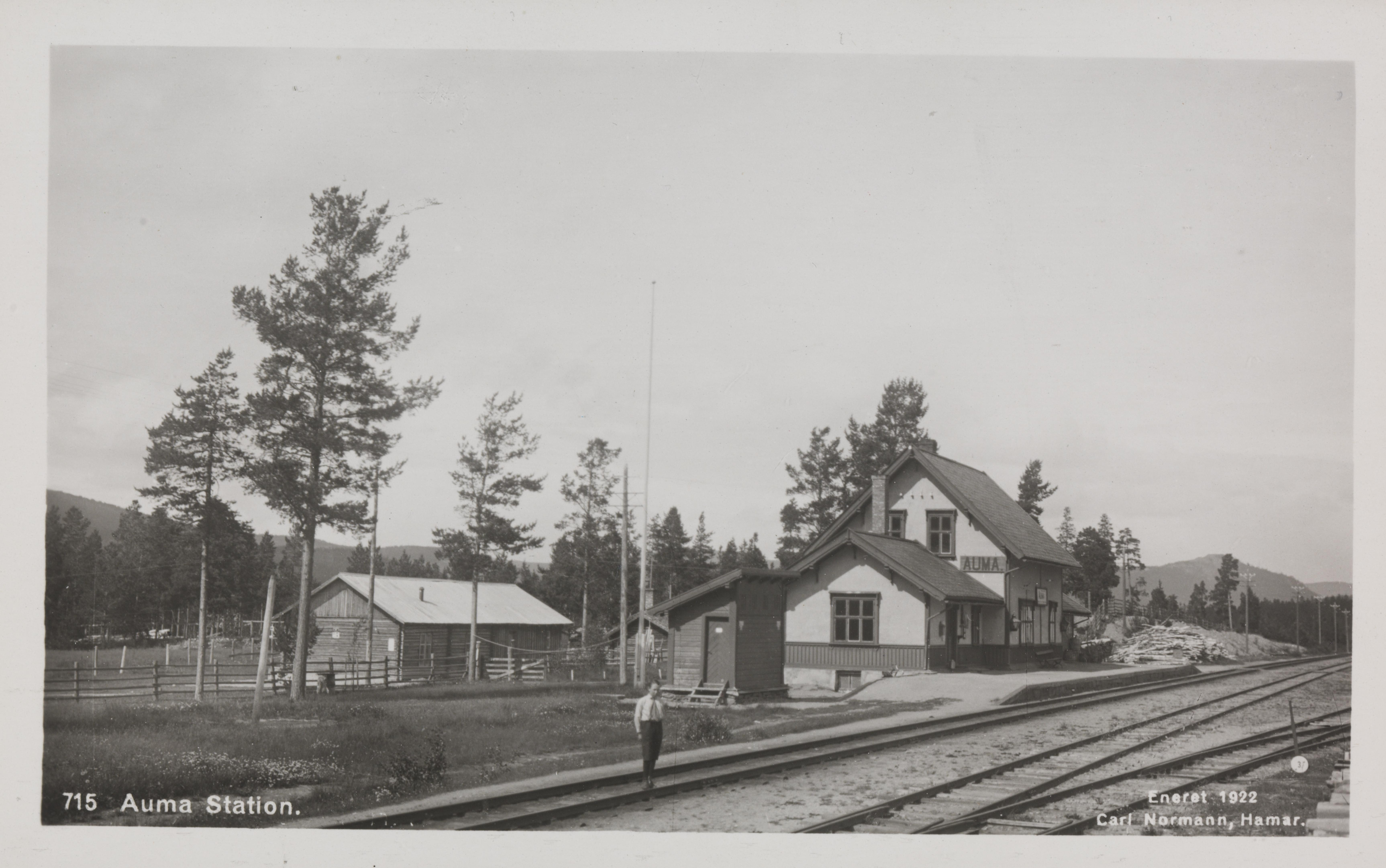 Bildet er hentet fra Nasjonalbibliotekets bildesamling Auma,Auma stasjon, Tynset, Hedmark